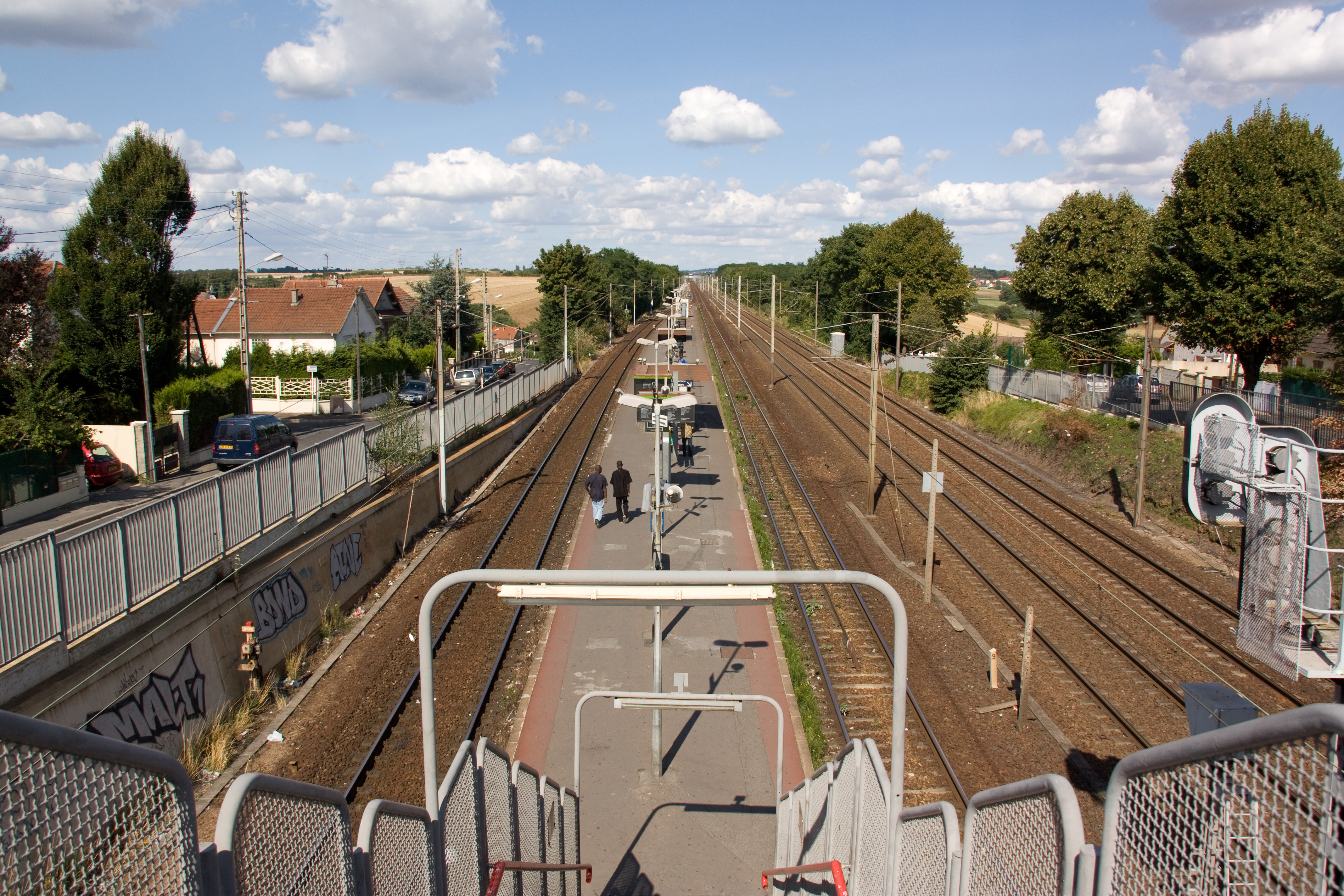 La Gare de Les Noues, département du Val-d'Oise, France